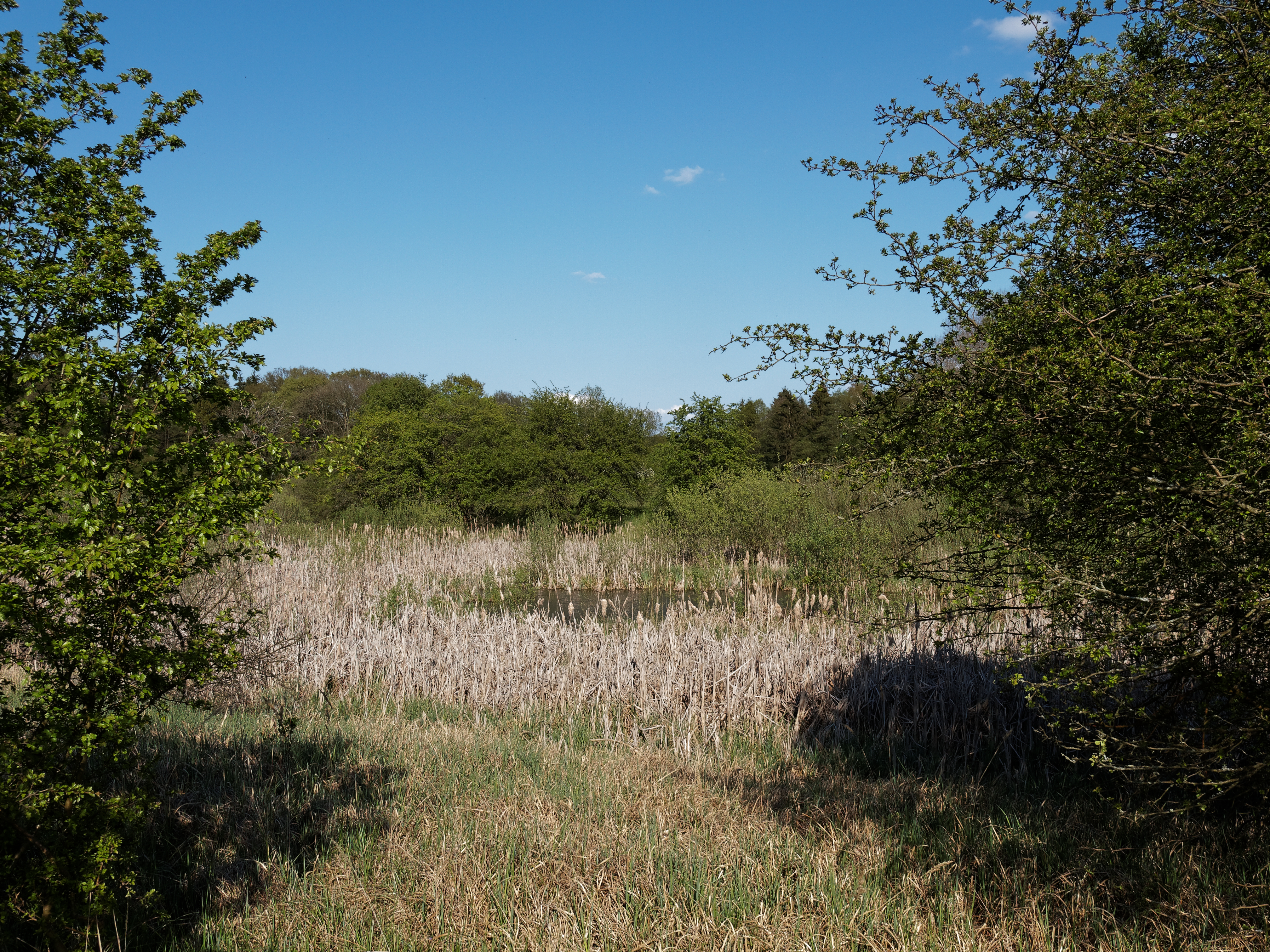 einer der typischen Tümpel die man in der Buckowseerinne findet